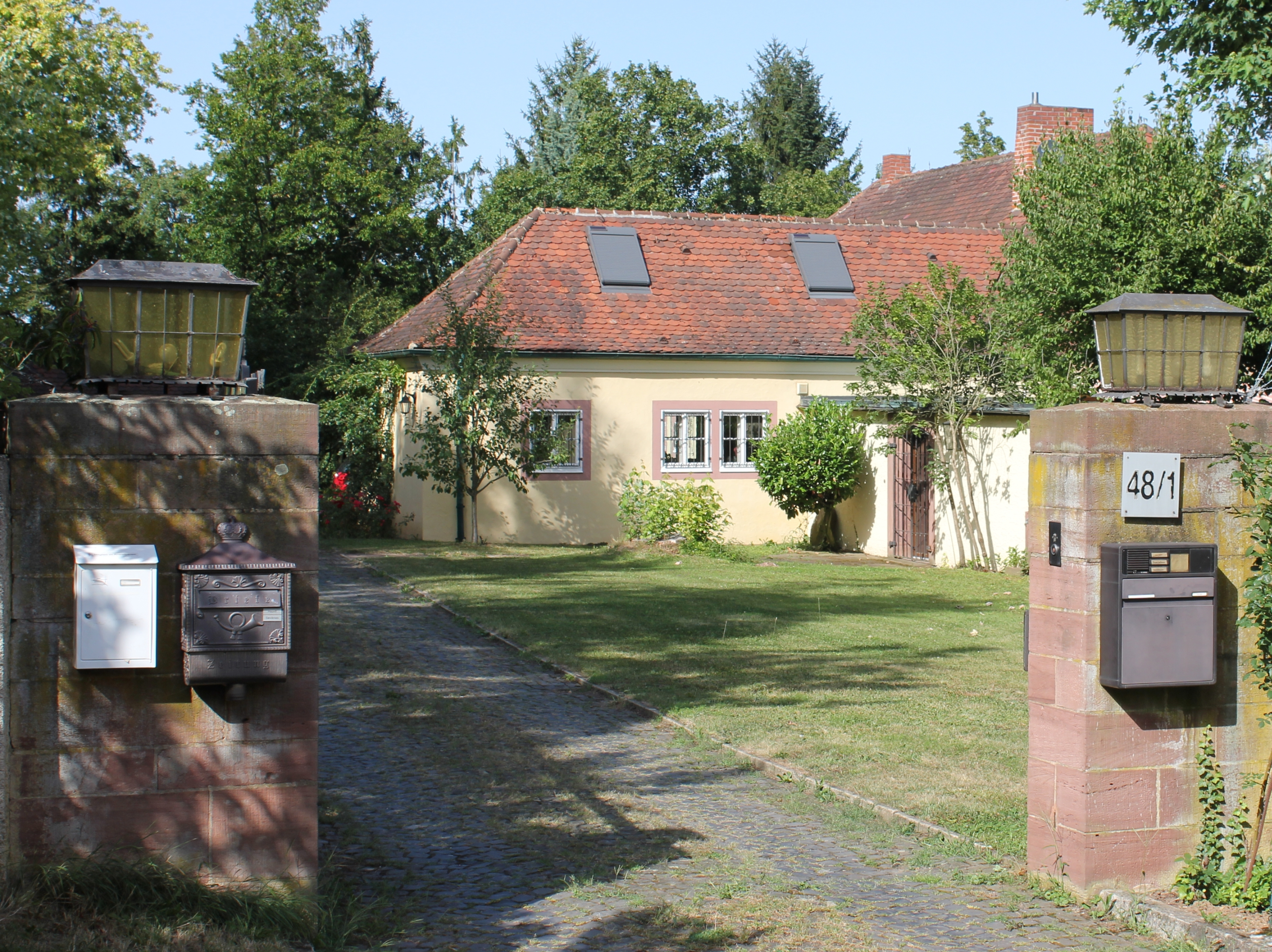 Villa Grünewaldstraße 48/1, vom Eingang des Grundstücks aus gesehen